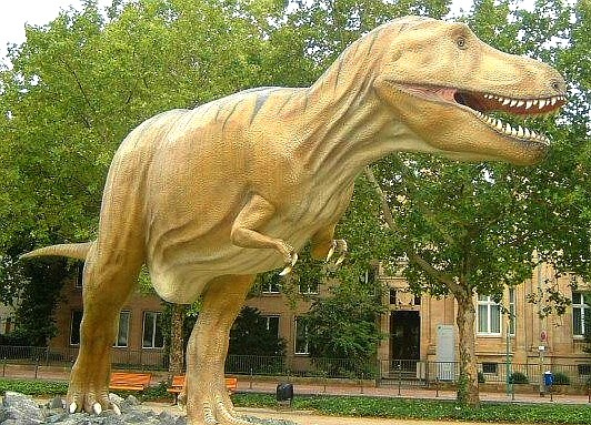 Tyrannosaurier vor dem Senckenbergmuseum in FFM. Auf dem Grünstreifen des Alleenrings (Senckenberganlage)